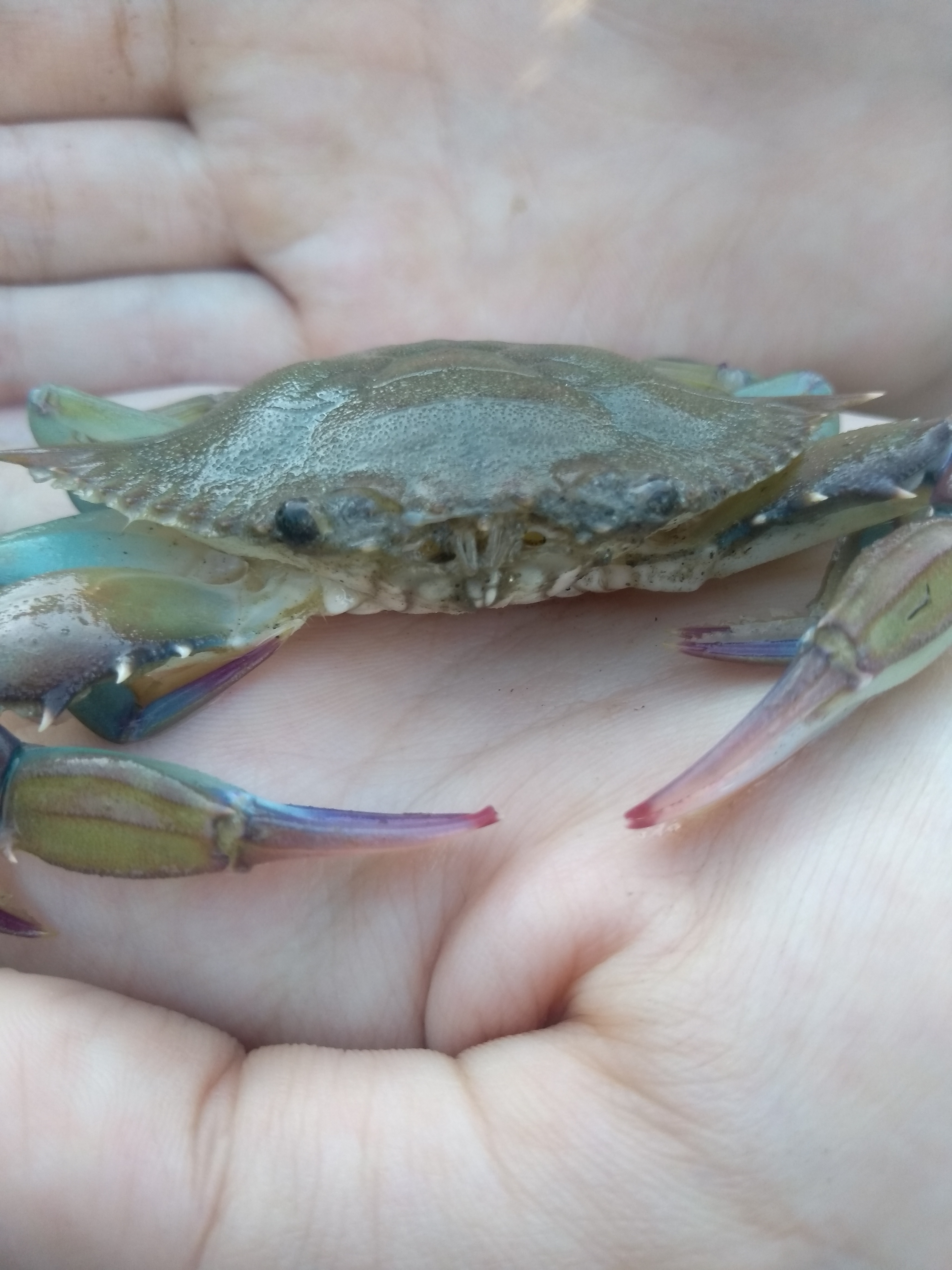 É um siri-azul encontrado na costa brasileira, no município de São Sebastião (SP), na praia do Araçá em uma região de manguezal. Este crustáceo pertence à classe Malacostraca e à ordem Decapoda.